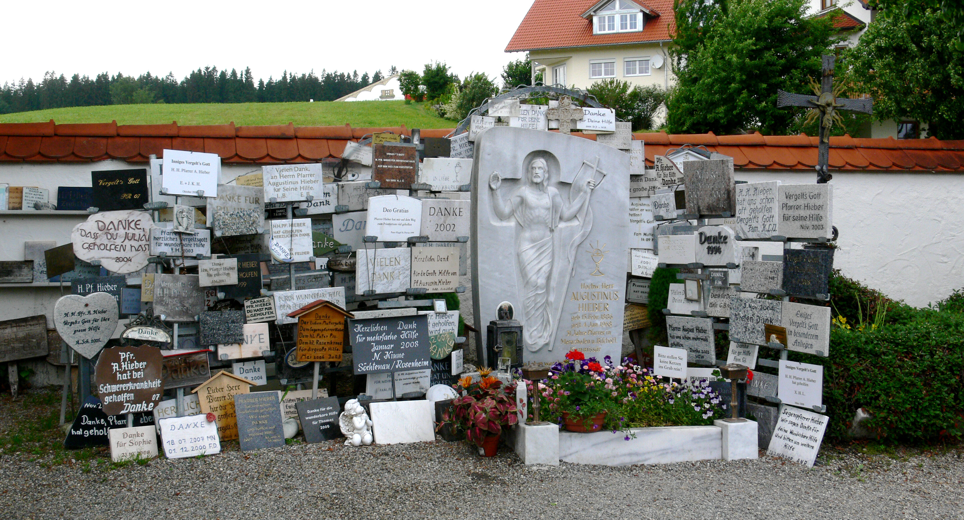 Friedhof Merazhofen, Stadt Leutkirch im Allgäu, Landkreis Ravensburg Grab des Pfarrers Augustinus Hieber